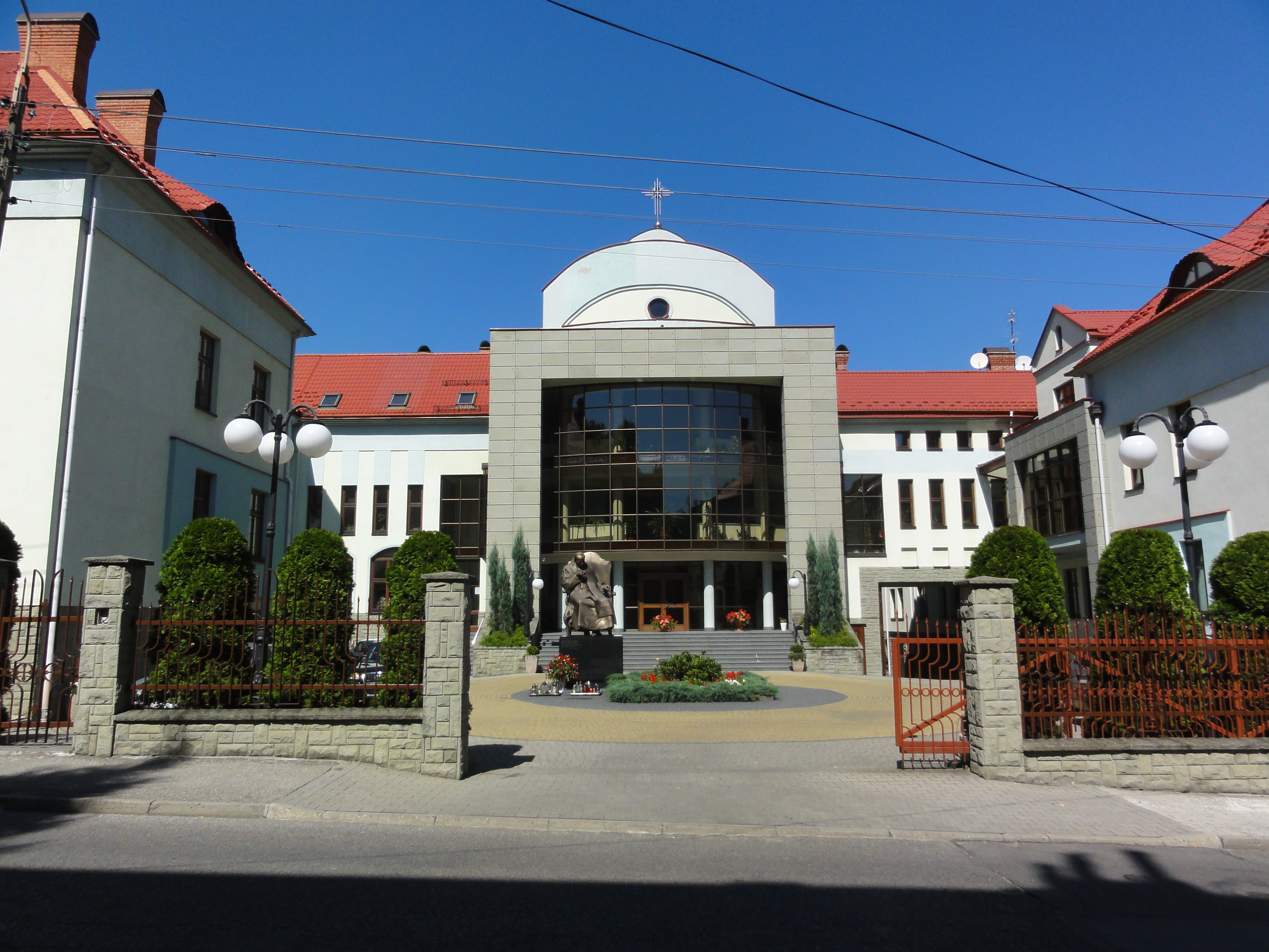 Bielsko-Biała, Żeromskiego 7 - Kuria Biskupia